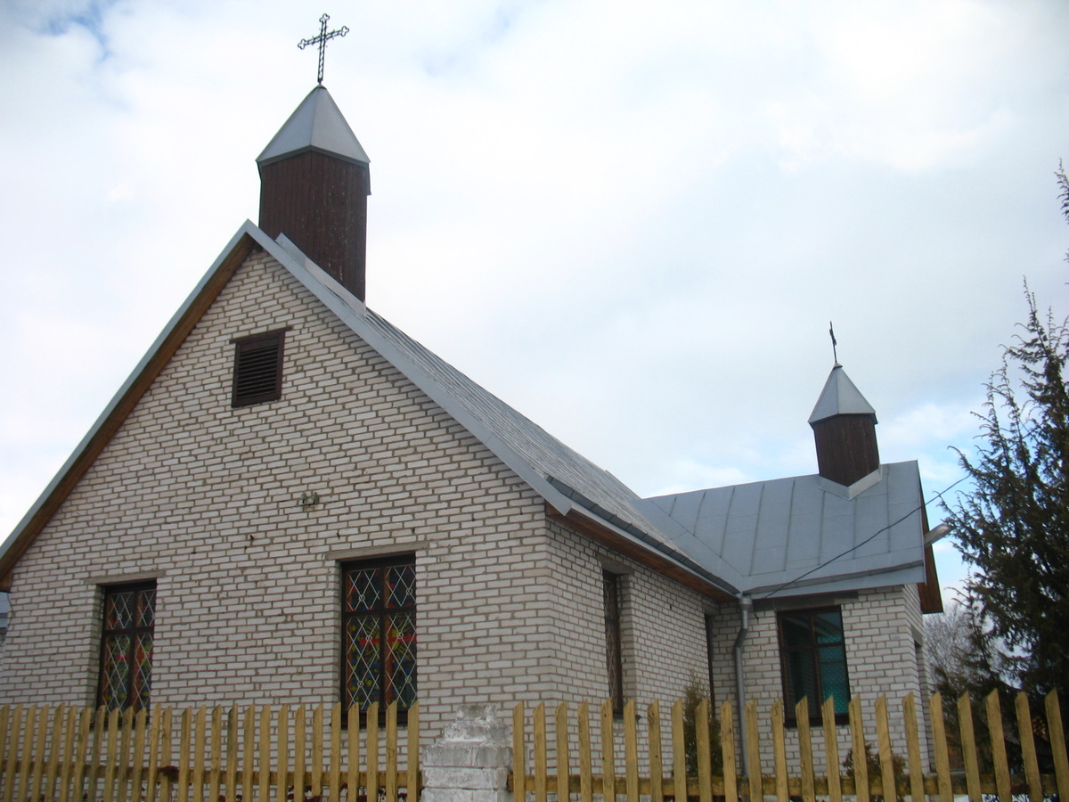 Беларуская (тарашкевіца): Груздава